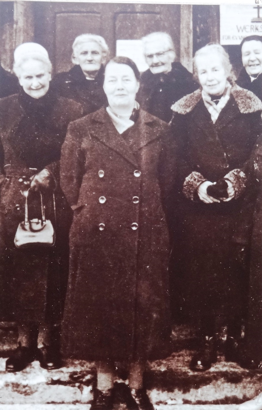 Auf dem Klostergelände erinnern mehrere aufgestellte Informationstafel an ehemalige Äbtinnen und andere Persönlichkeiten.